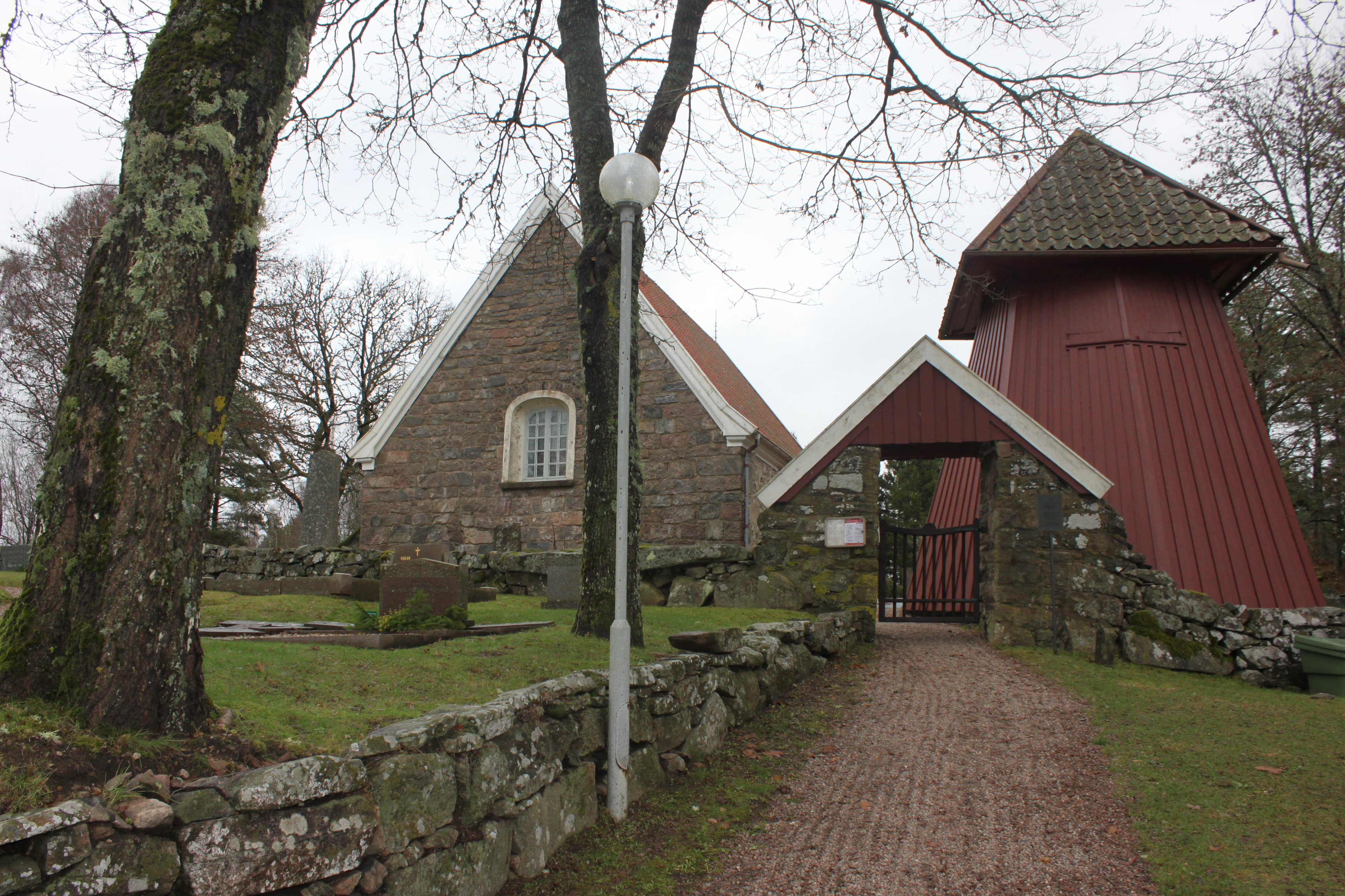 Fullestads kyrka. 2 november 2013.